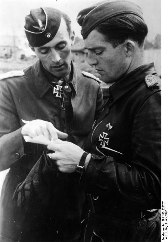 Russland, Pilot Nordmann An der Sowjetfront: Eichenlaubträger Hauptmann Nordmann, der in den letzten Tagen seinen 74ten Luftsieg errang. PK-Aufnahme Kriegsberichter Grosse (Sch) 3823-42 "Fr.Fr.OLF." Juni 1942 B 28 707 [Russland.- vlnr Hauptmann Karl Gottfried Nordmann, Pilot mit unbekanntem Offizier] Abgebildete Personen: Nordmann, Karl Gottfried: Oberst, Ritterkreuz (RK), Luftwaffe, Deutschland